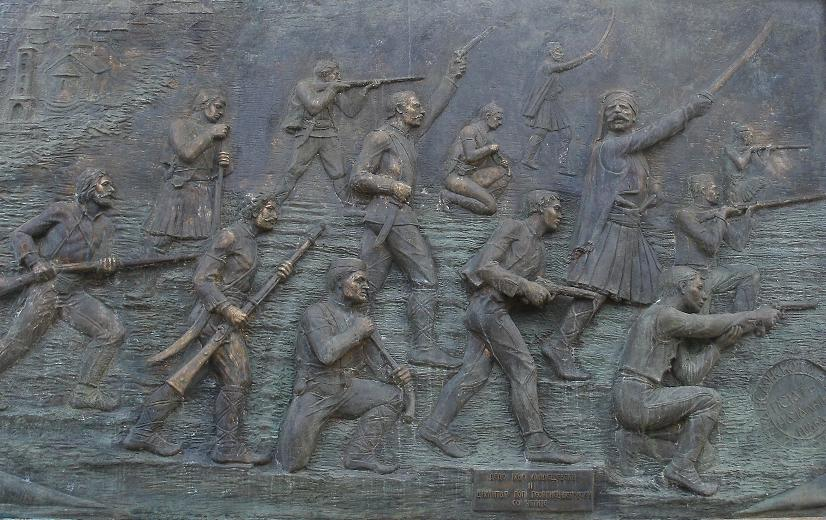 Дедо Иљо Малешевски и Димитар Поп Георгиев со четата